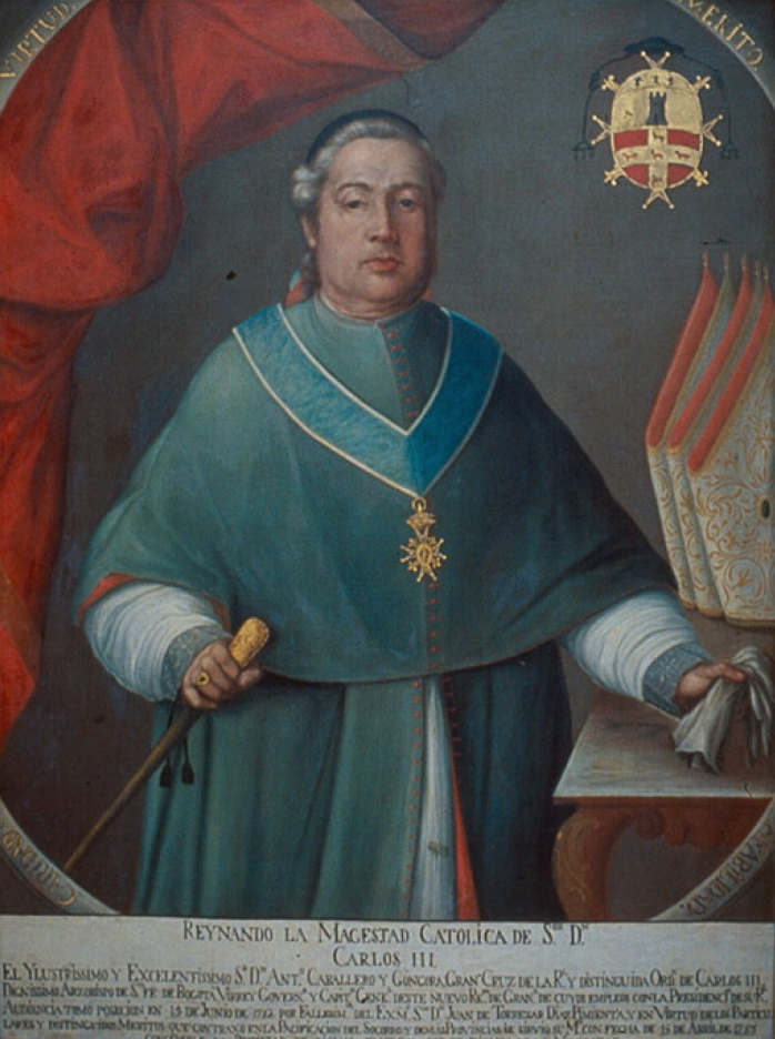 Arzobispo de Bogotá y Virrey de Nueva Granada (1782-89), Antonio Caballero y Góngora